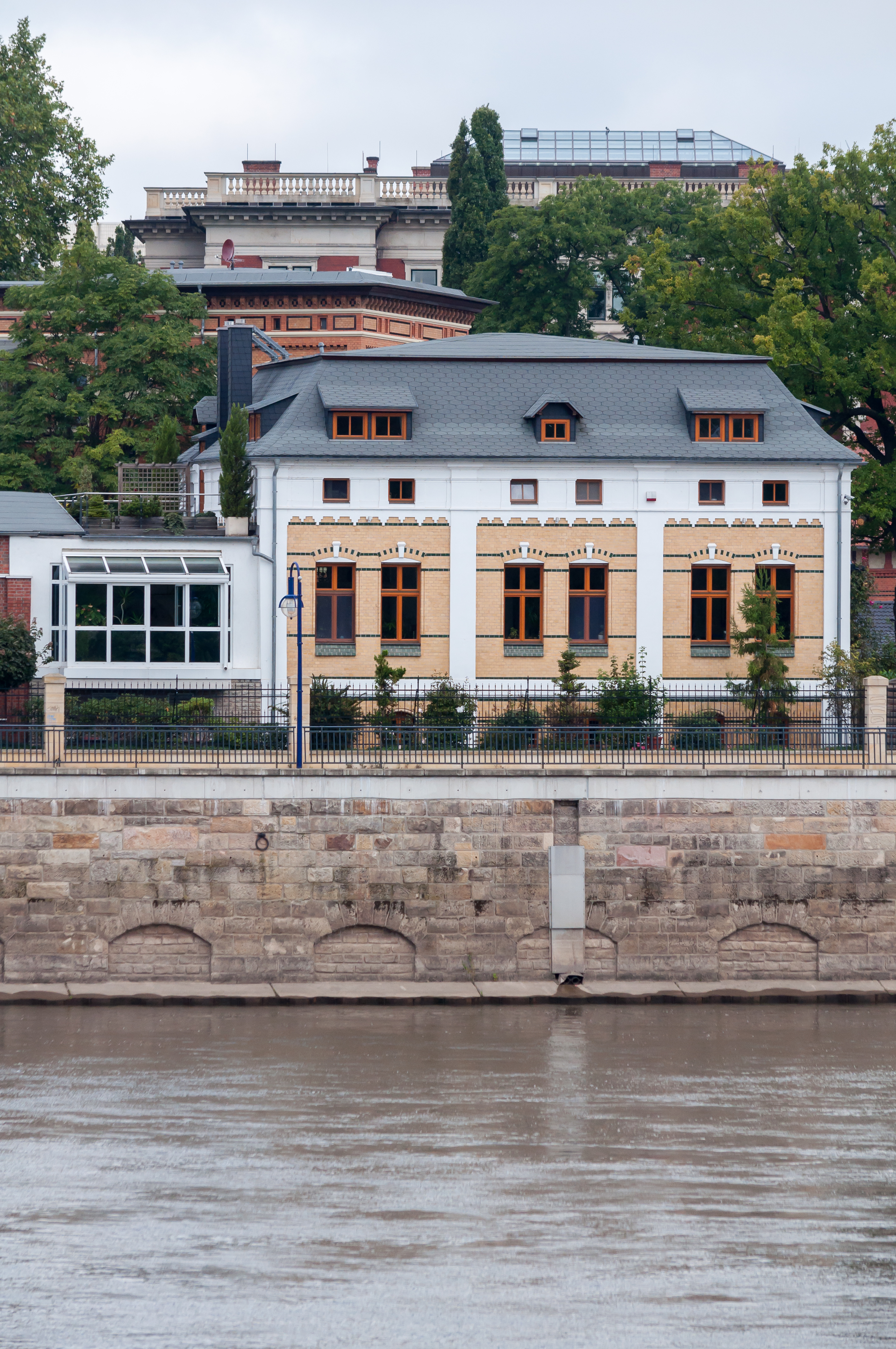 Gebäude des ehemaligen Elbbahnhofs in Magdeburg-Altstadt. This is a photograph of an architectural monument.It is on the list of cultural monuments of Magdeburg